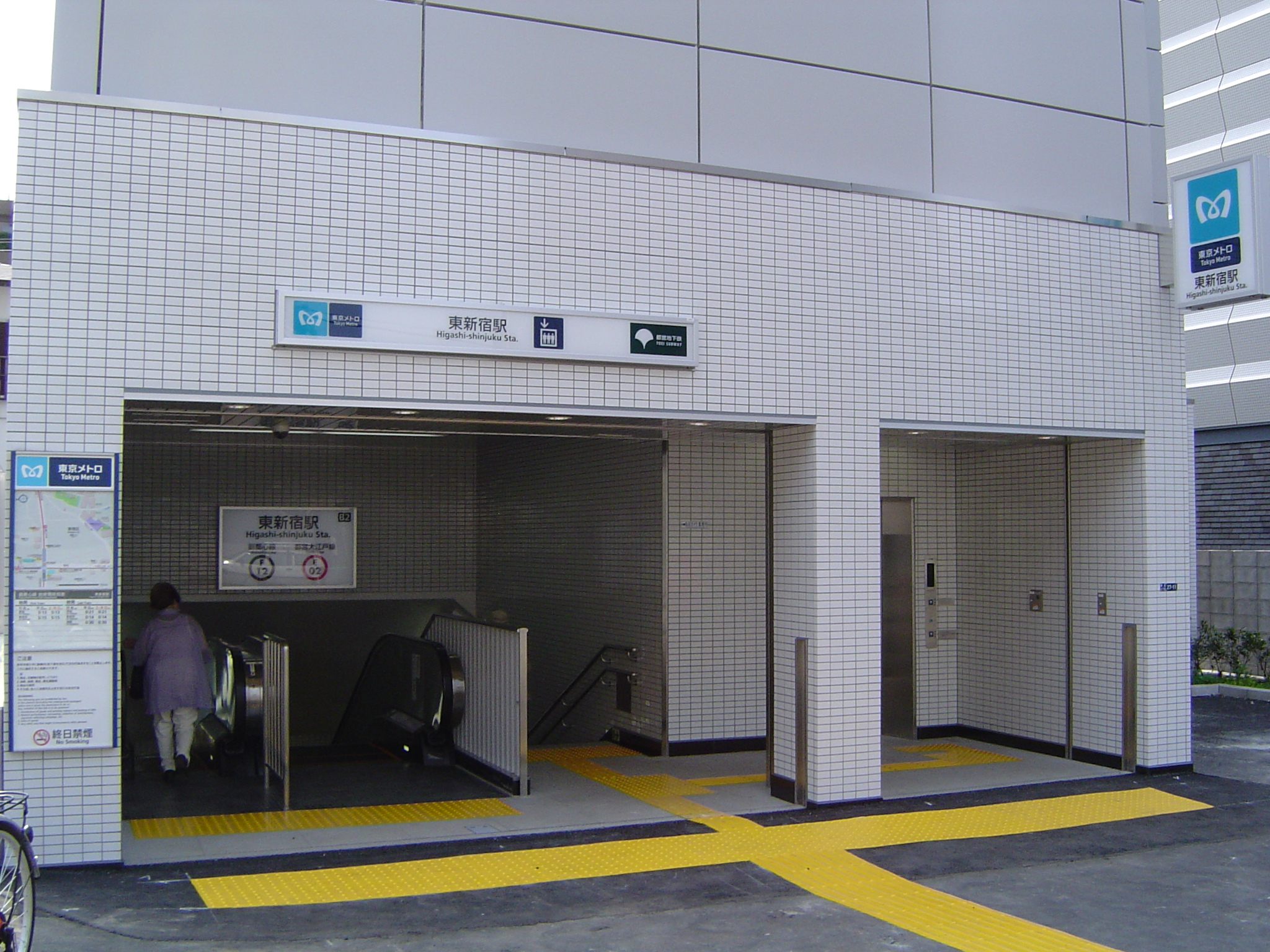 東新宿駅（都営地下鉄大江戸線・東京メトロ副都心線）B2出入口